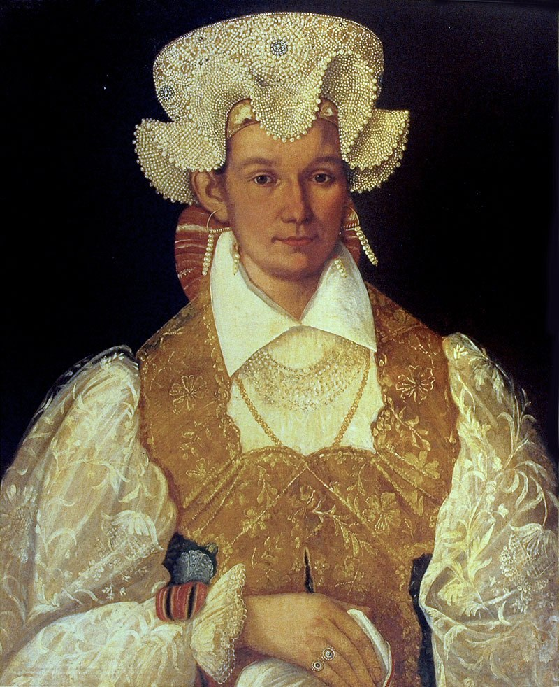 Абрам Клюквин (1777-1867) «Портрет новгородской крестьянки с белым платком в руке» 1830-е Неизвестный художник. Портрет купчихи в праздничной народной одежде новгородской губернии